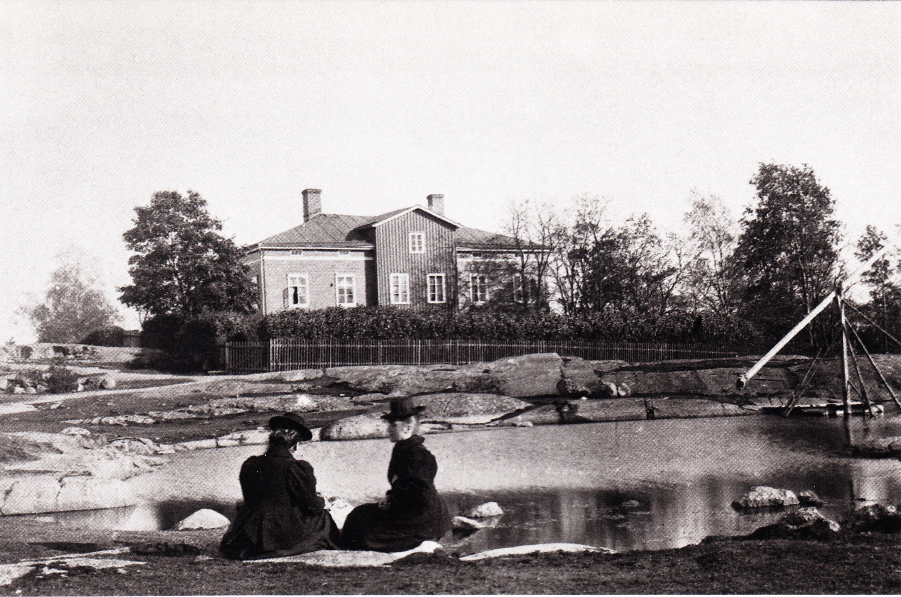 Pernon kartano puistolampi vuonna 1886